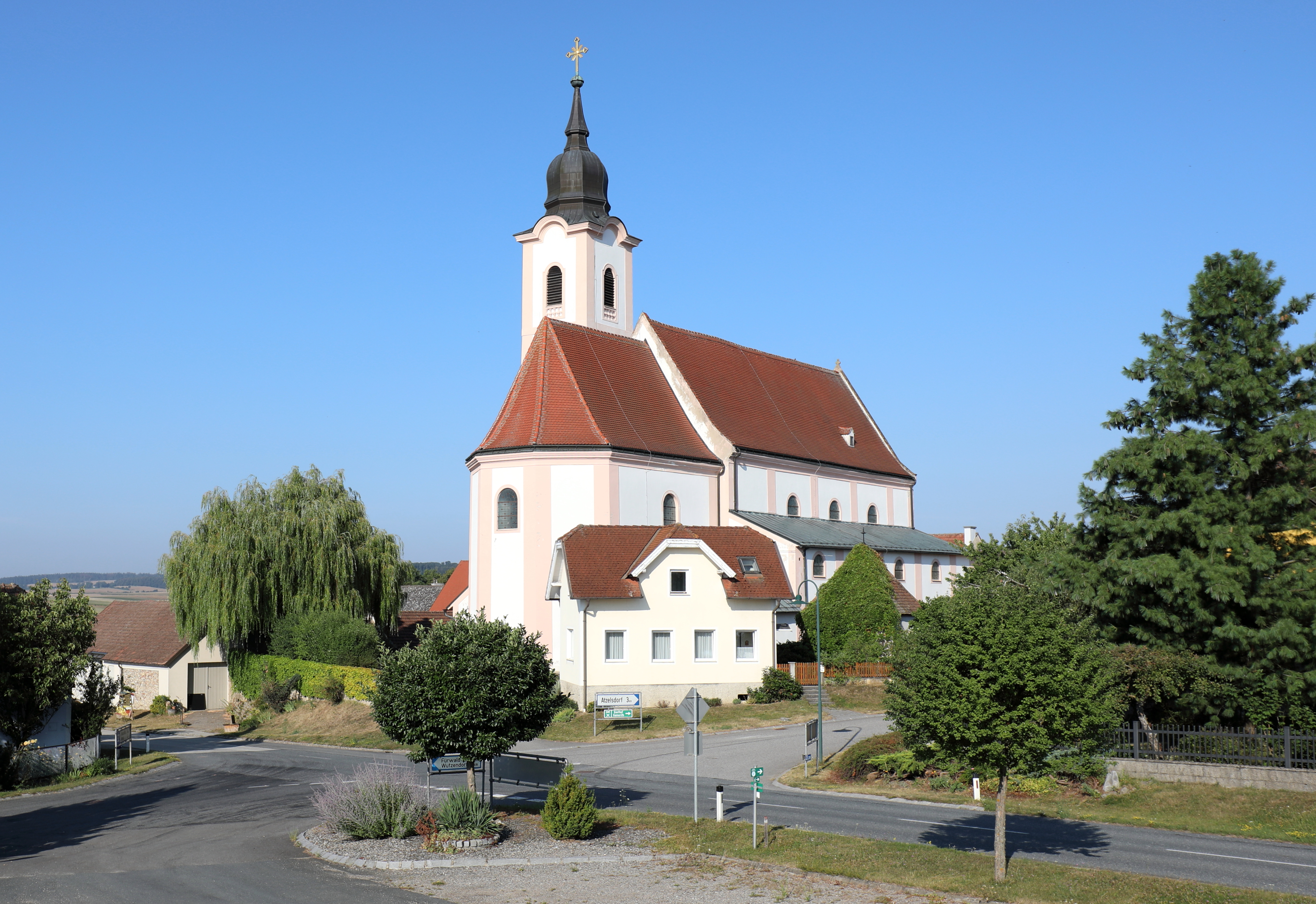 Ostansicht der röm.-kath. Pfarrkirche hl. Maria in St. Marein, ein Ortsteil der niederösterreichischen Gemeinde Brunn an der Wild. Die ehemalige Wallfahrtskirche ist ein basilikaler Barockbau, der südseitig über gotischen Grundmauern errichtet wurde.